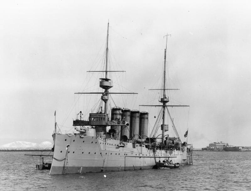 HMS DEVONSHIRE.